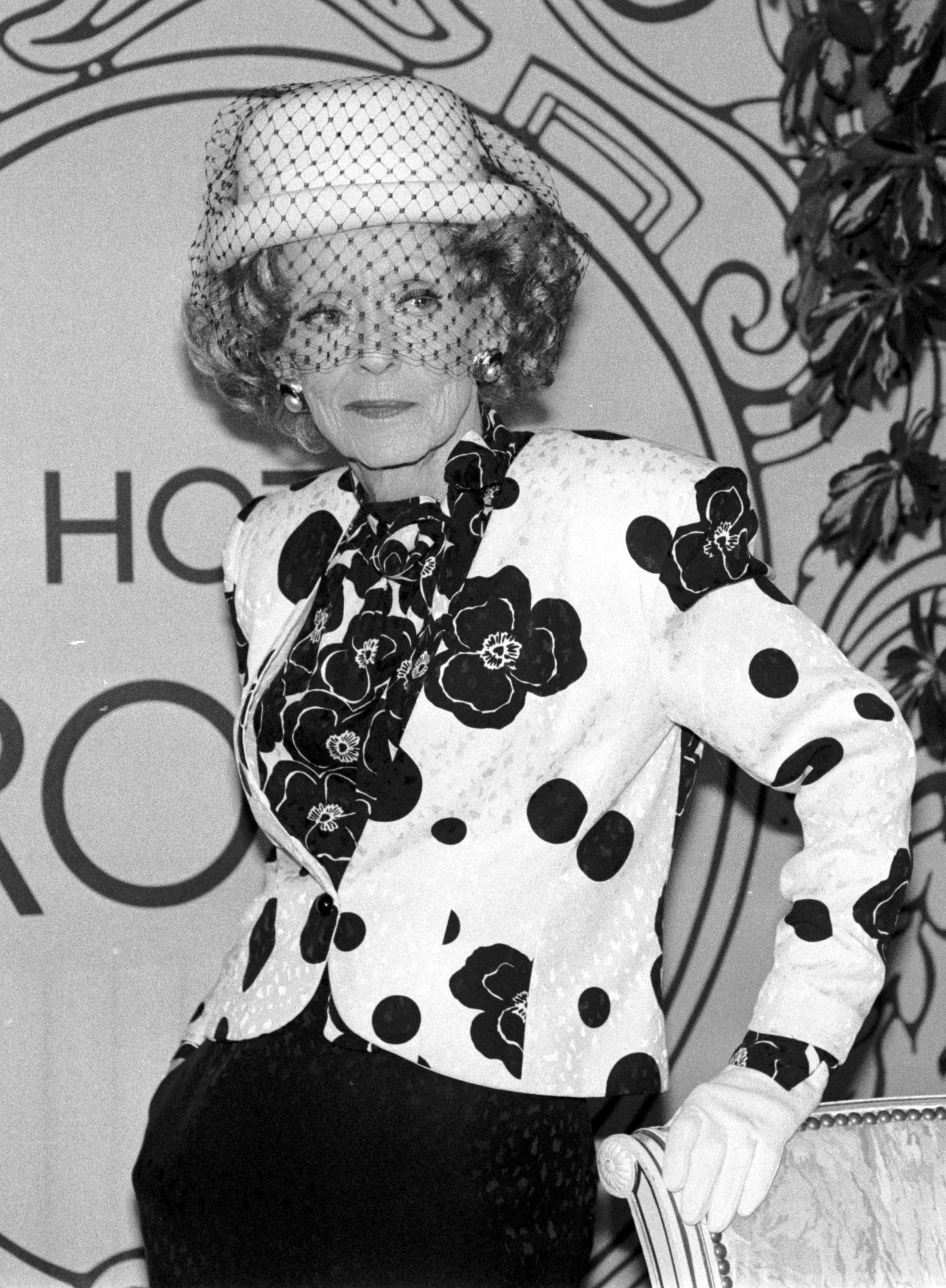 L'actrice américaine Bette Davis au Festival du cinéma américain de Deauville (Normandie, France) en septembre 1987.